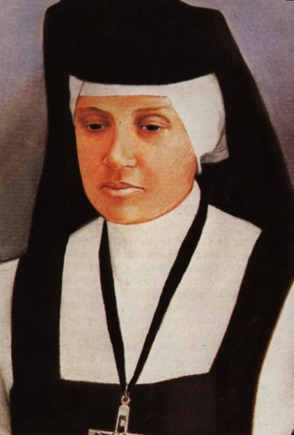 Pintura de la Beata María de San José Alvarado Cardozo, primera Beata de Venezuela